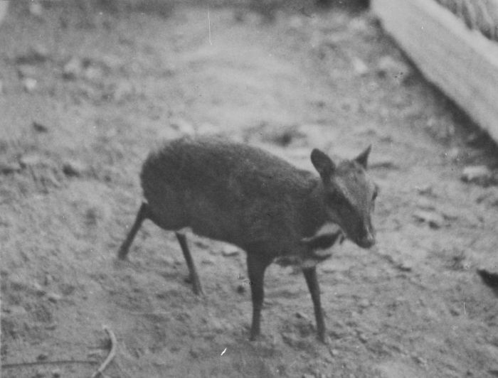 foto. Een kantjil (dwerghert) in een kippenhok Unknown language: Kancil